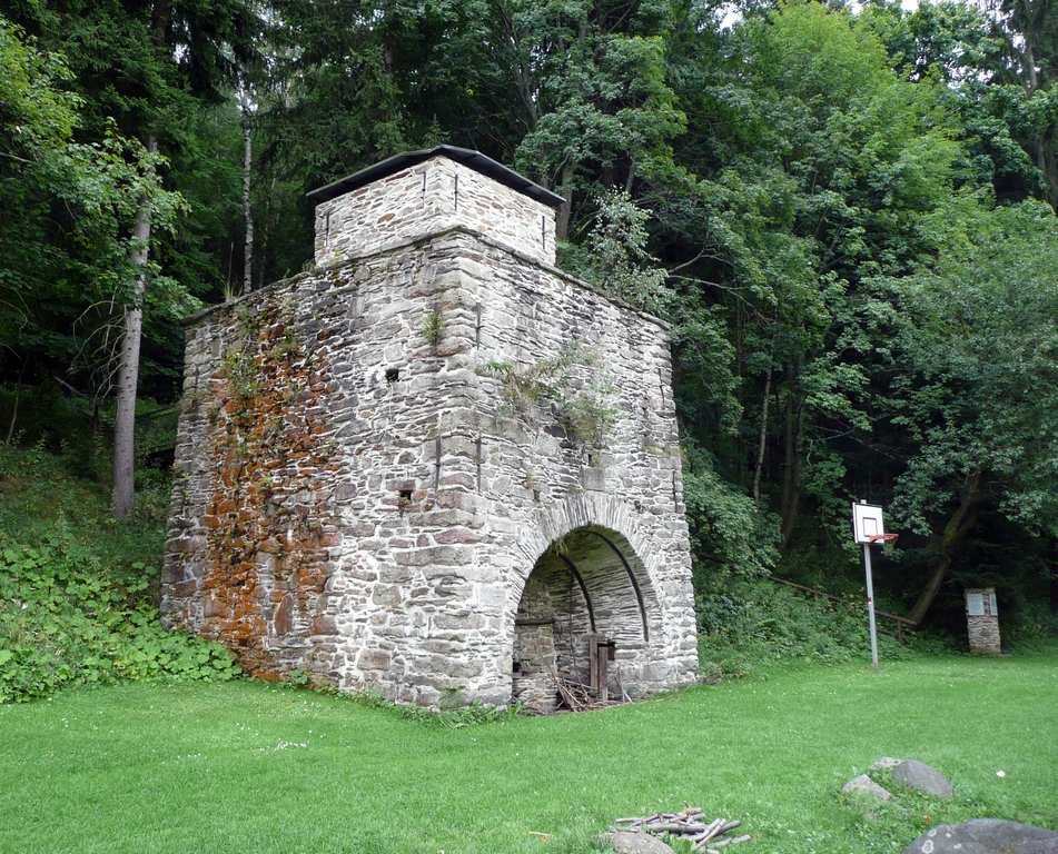 Blick auf den historischen Hochofen des Hammerwerkes Schmalzgrube im Erzgebirge. Der Ofen entstand 1659 und wurde 1819 erneuert. Er gehört zu den wenigen erhaltenen historischen Hochöfen im Gebiet der Neuen Bundesländer. Vergleichbare Anlagen sind nur noch an den Standorten Brausenstein (erhaltener Hochofen von 1693), Peitz (erhaltener Hochofen von 1809), Morgenröthe-Rautenkranz (erhaltener Hochofen von 1820/22) und Schmalkalden (Neue Hütte) (erhaltener Hochofen von 1835) vorhanden.